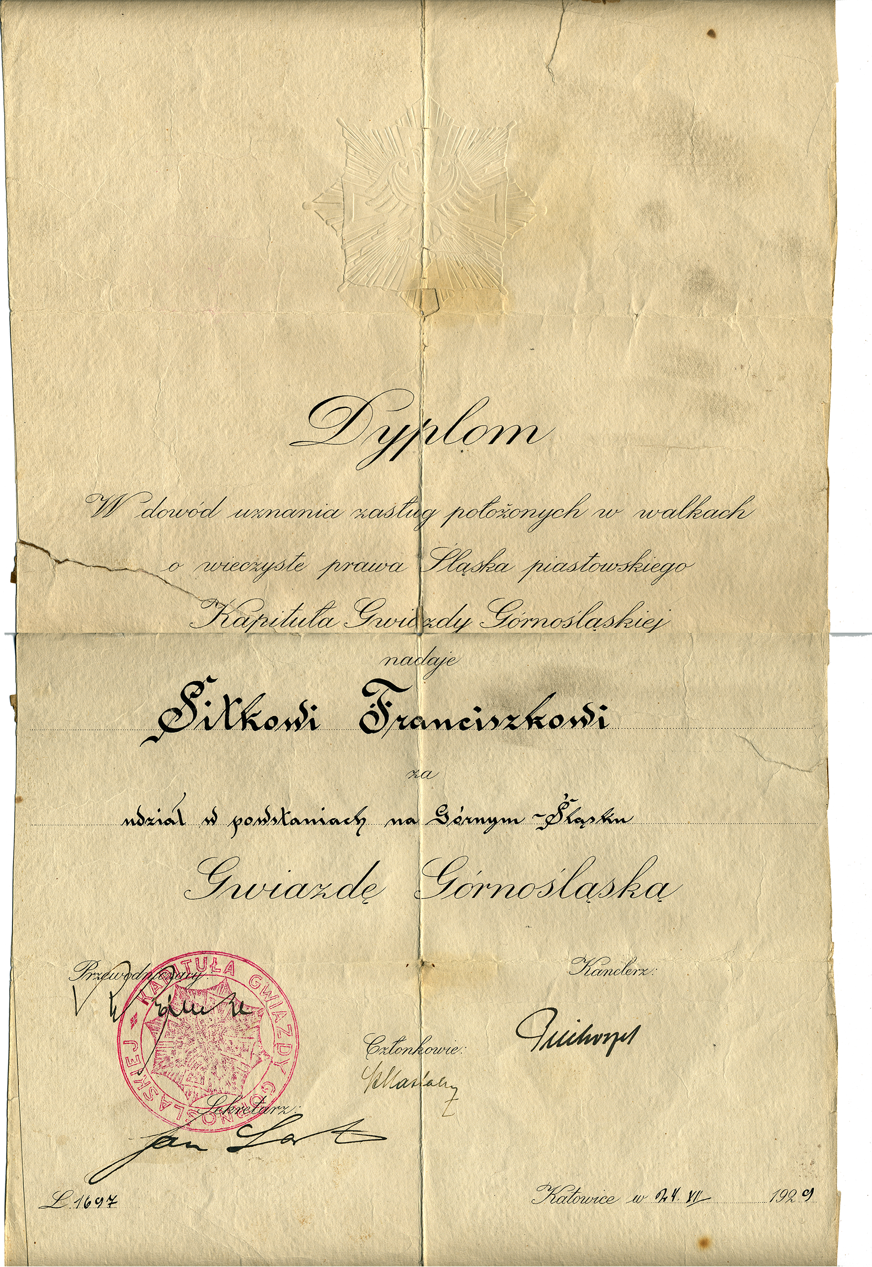 Franciszek Sitek 1895-1931 Dyplom nadania Gwiazdy Górnośląskiej wystawiony 24 czerwca 1929 roku w Katowicach przez Kapitułę Gwiazdy Górnośląskiej, liczba 1697